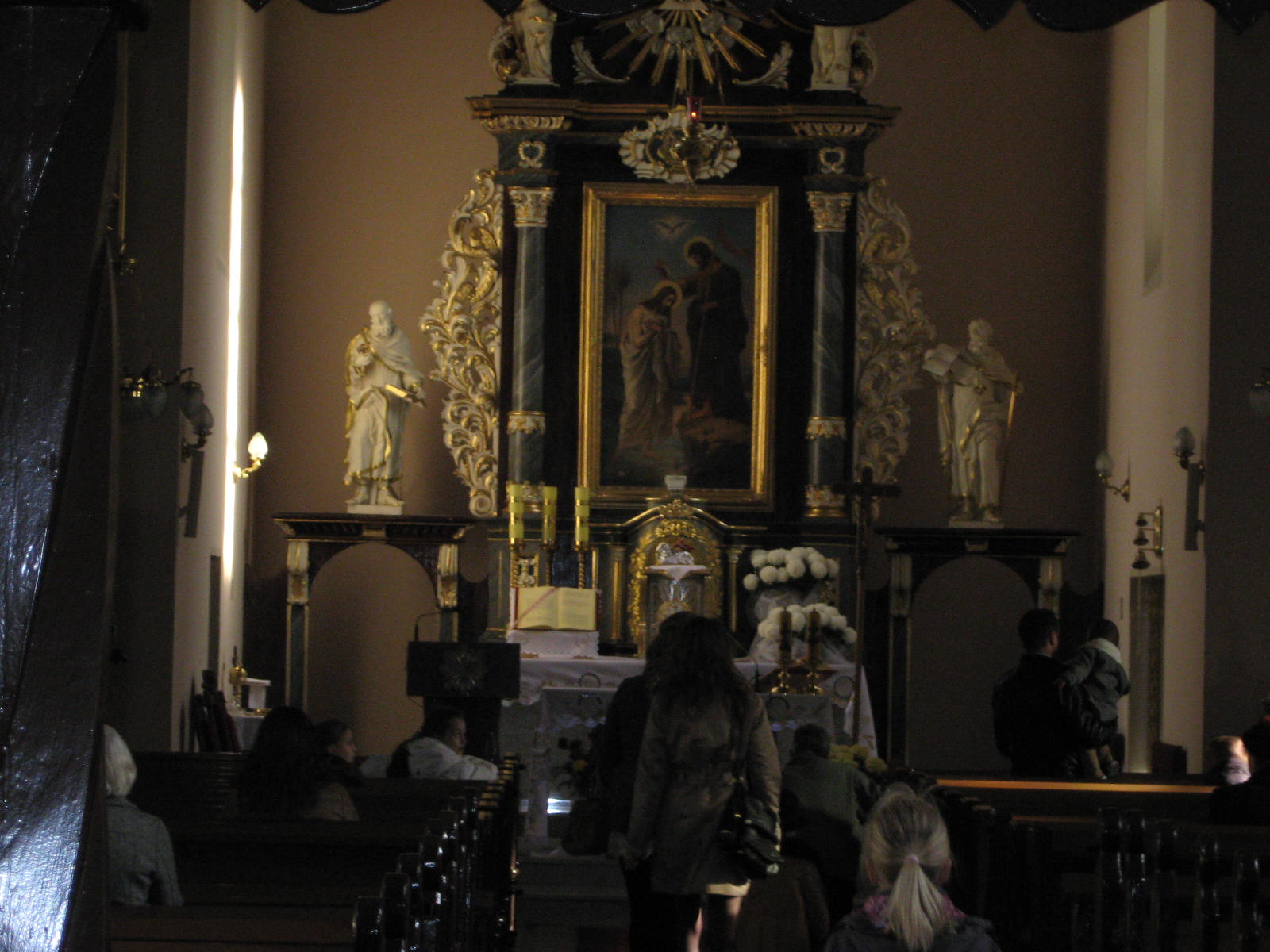 Ołtarz główny